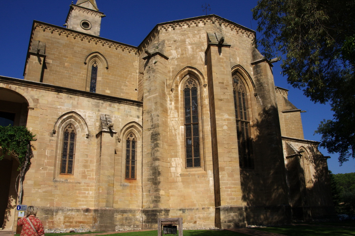 Monestir de Santa Maria Bellpuig de les Avellanes (Os de Balaguer-la Noguera-Catalunya)